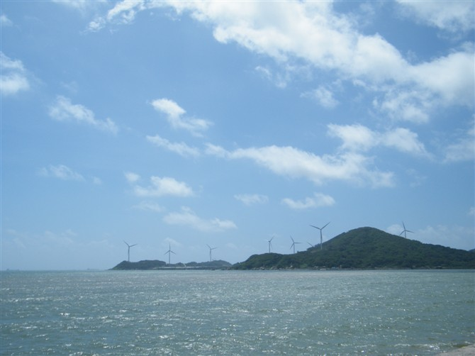 广澳 汕头保税区东海岸南望表角的风车 后江湾